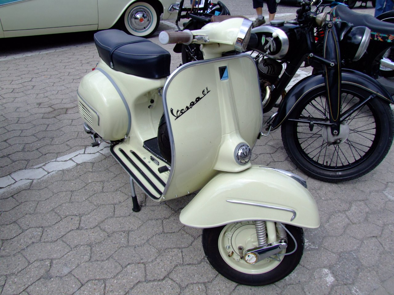 Piaggio Vespa 150 GL 1962-65